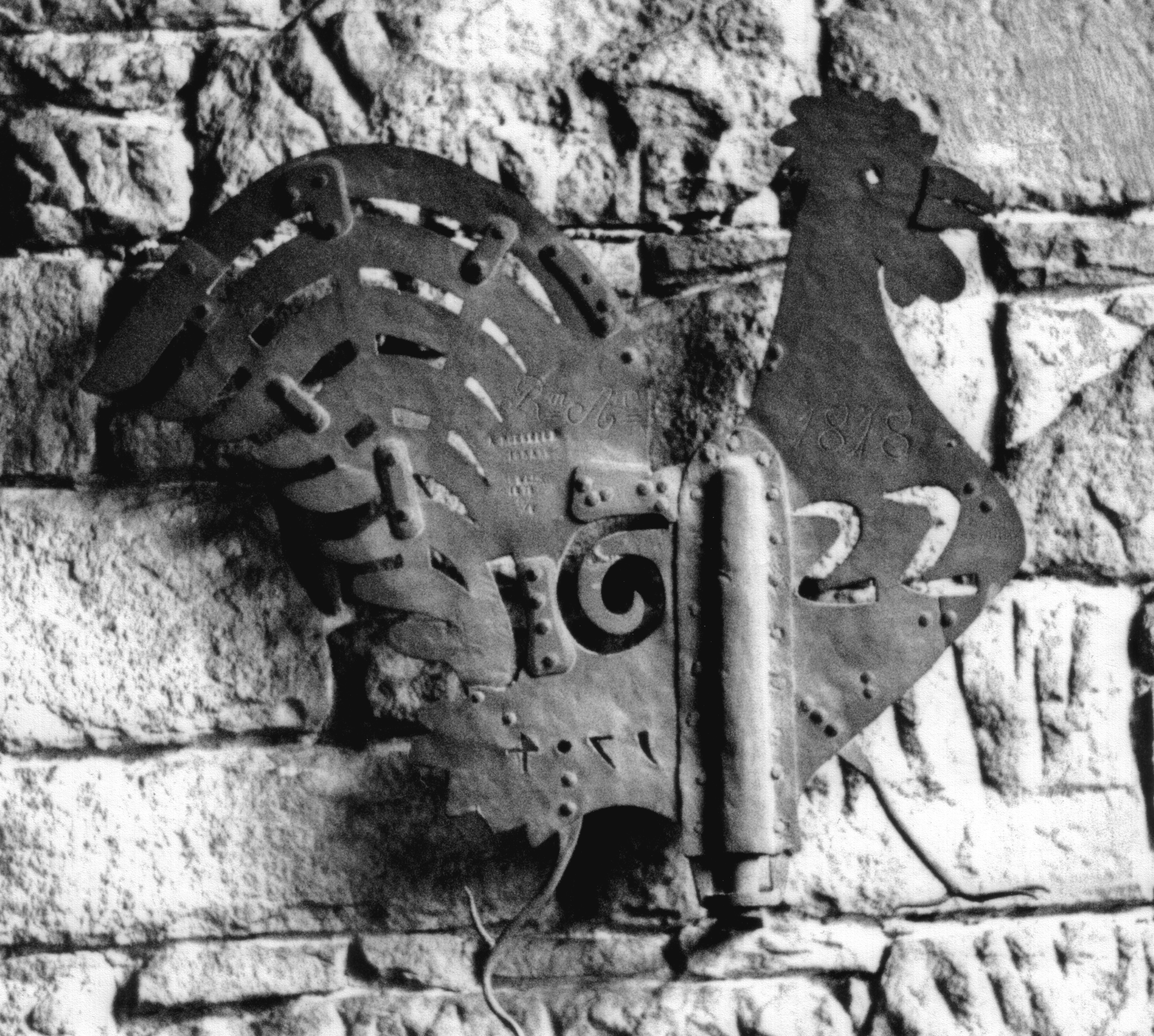 Historischer Wetterhahn von 1622 der spätgothischen Annakirche in Düren. Heute im Vorraum ausgestellt.